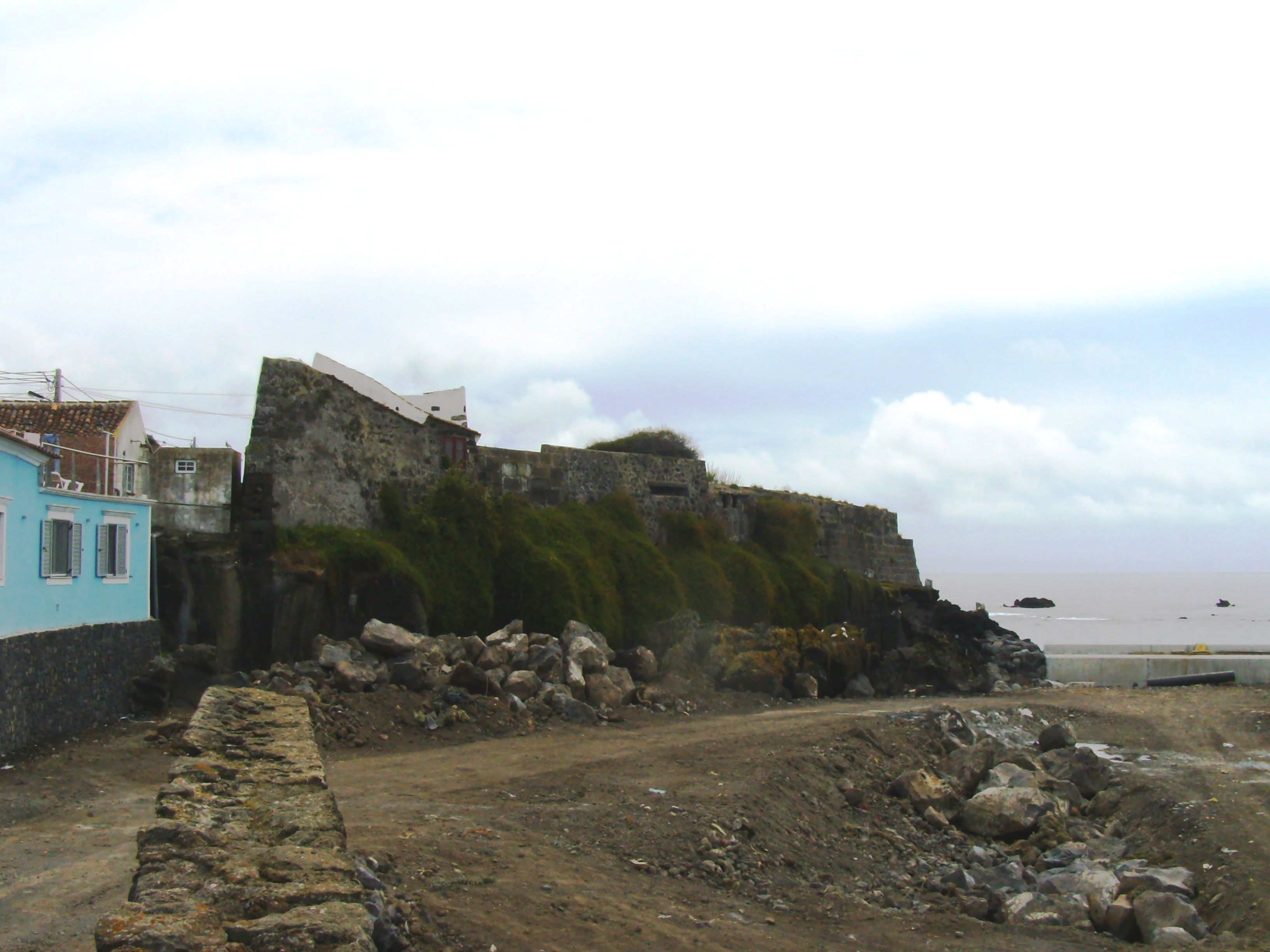 Forte Grande de São Mateus, São Mateus da Calheta, Angra do Heroísmo, Ilha Terceira, Açores.